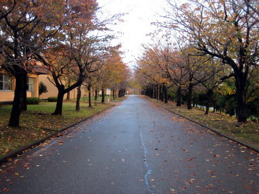 ฤดูใบไม้ร่วงในมหาวิทยาลัยเทคโนโลยีนะงะโอะกะ